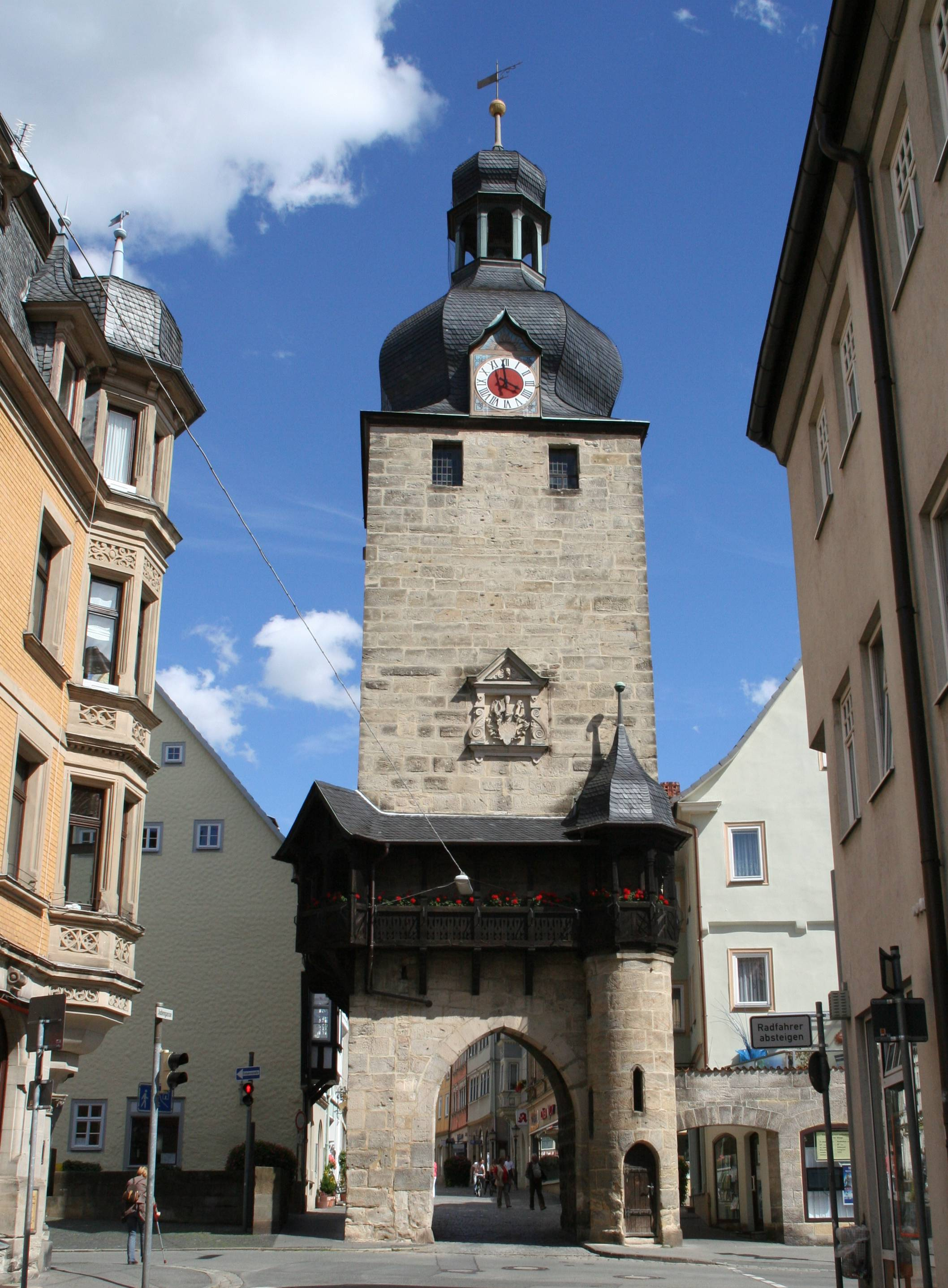 Judentor Nord-Westseite in Coburg